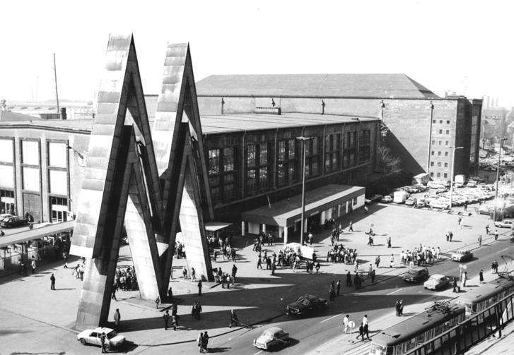 Leipzig, Frühjahrsmesse, Nordeingang ADN-ZB Lehmann 19.3.86 pe Leipzig: Frühjahrsmesse 86-Am Nordtor des Messegländes an der Leninstraße befindet sich das überdimensionale Doppel-M, das Symbol der Leipziger Messe. Im Hintergrund sieht man die Messehallen 1,2,3 und 4.